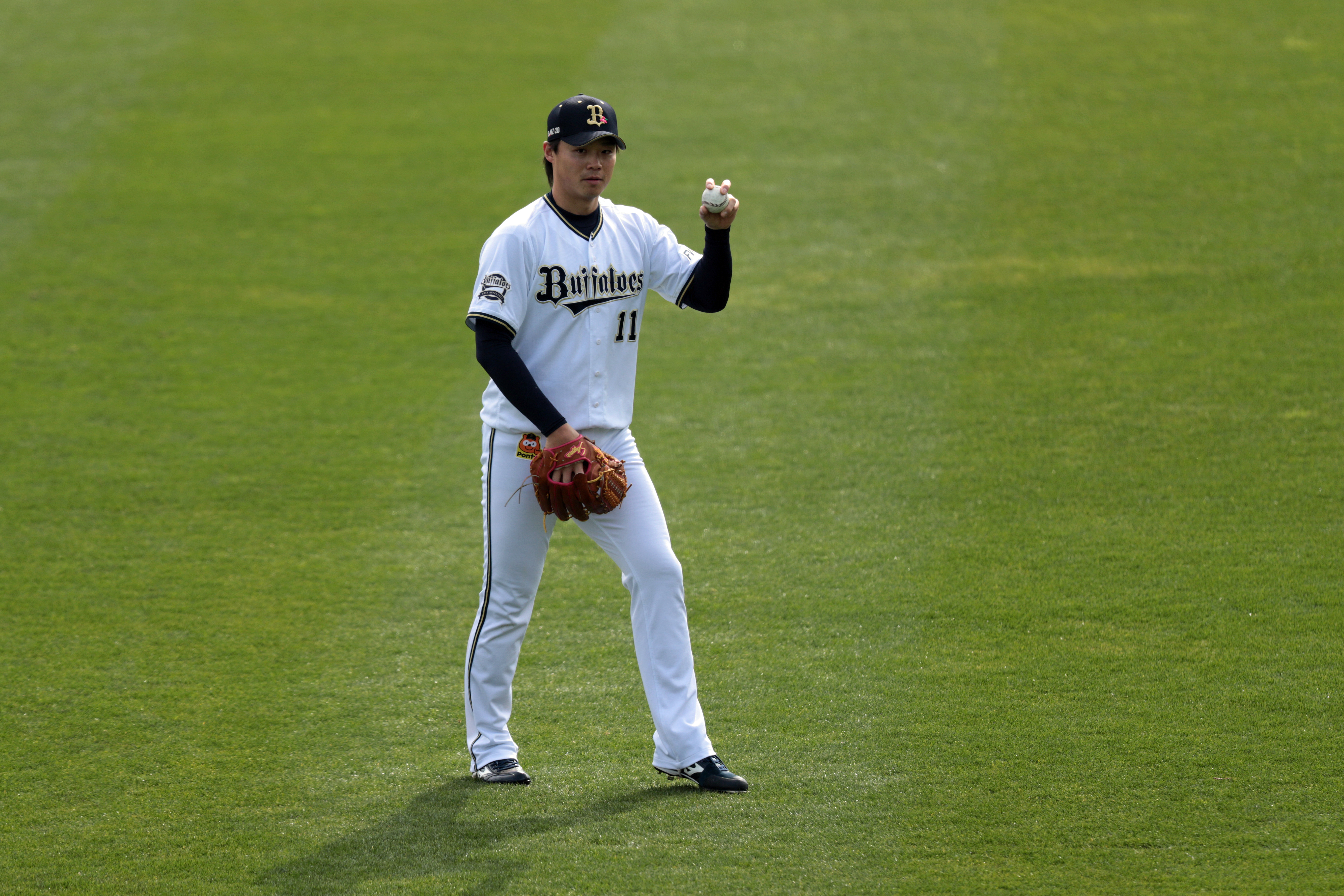 オリックス・バファローズ投手の山崎福也。清武総合運動公園SOKKENスタジアムにて。